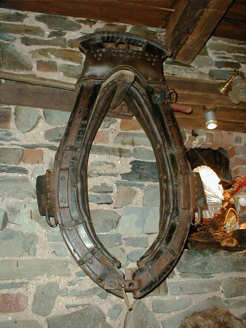 Walon: gorea pindou po gåyoter ene bele plaece